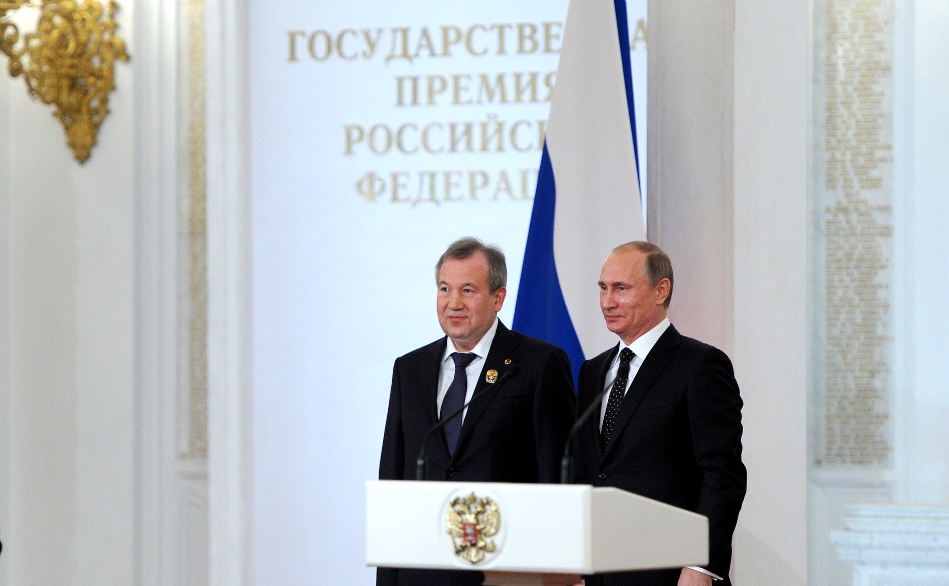 С лауреатом Государственной премии Российской Федерации в области науки и технологий 2014 года присуждена Геннадию Красникову